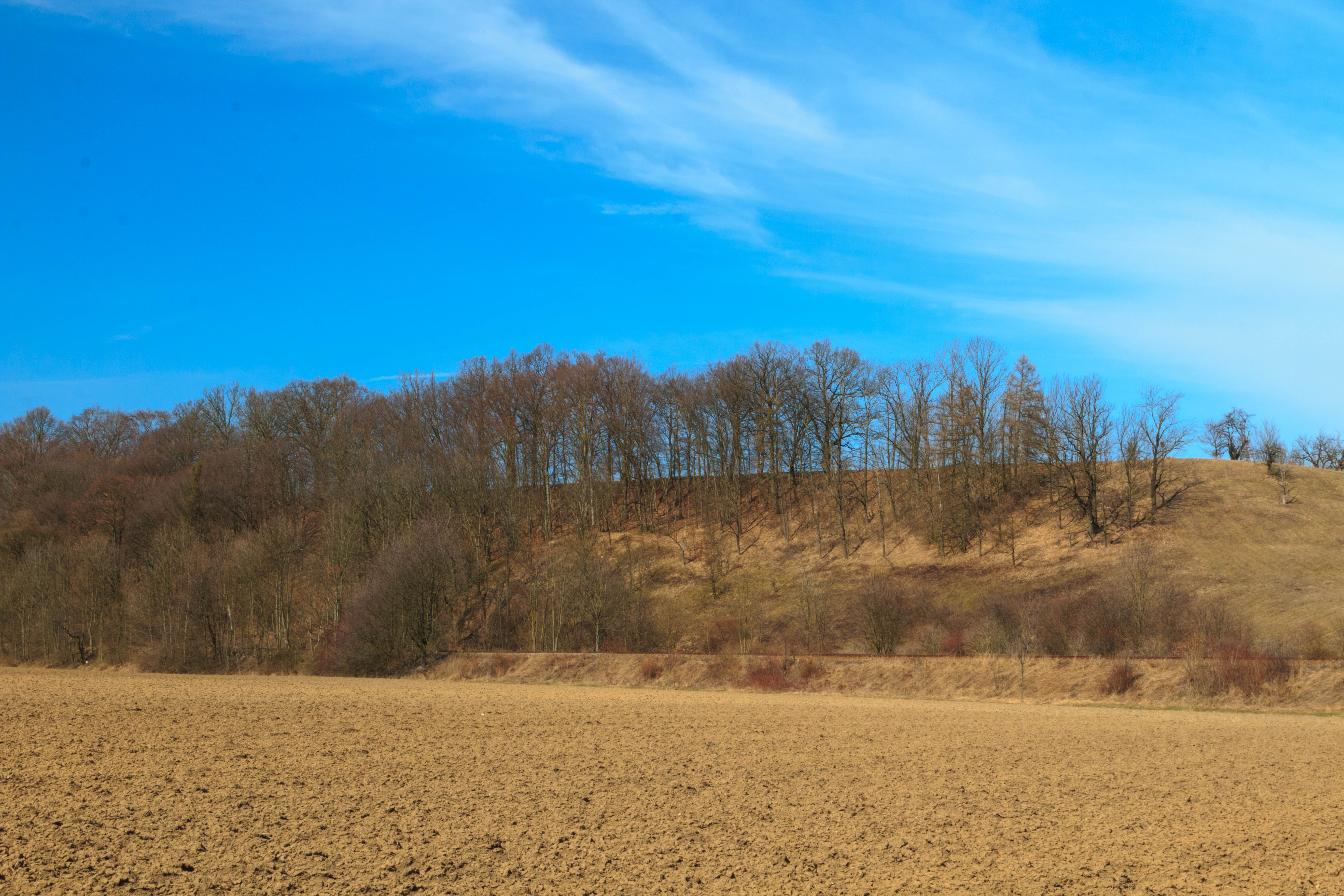 PR Zámělský borek Project: Chráněná území.